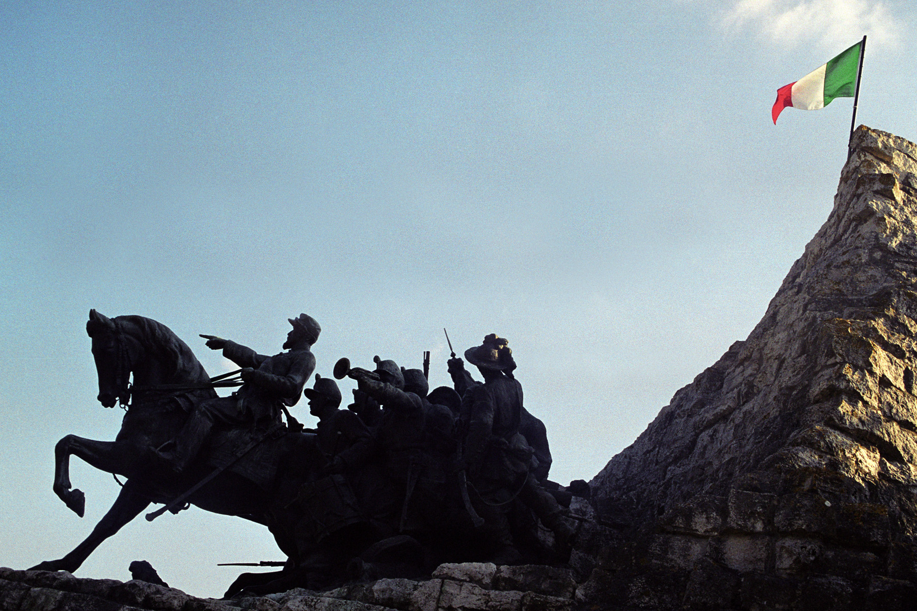 Monumento a ricordo di Enrico Cialdini e della battaglia di Castelfidardo. Fu inaugurato nel 1912, ed è opera dello scultore Vito Pardo.Avanti miei prodi